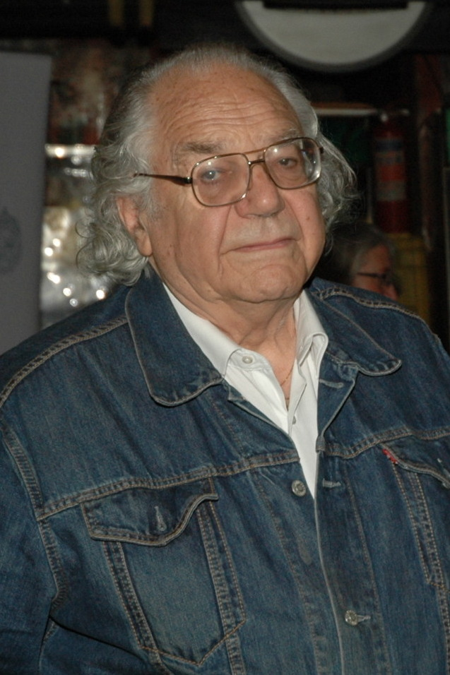 Lanzamiento del libro “Apuntes para una historia del video en Chile” de Germán Liñero, Café Journal